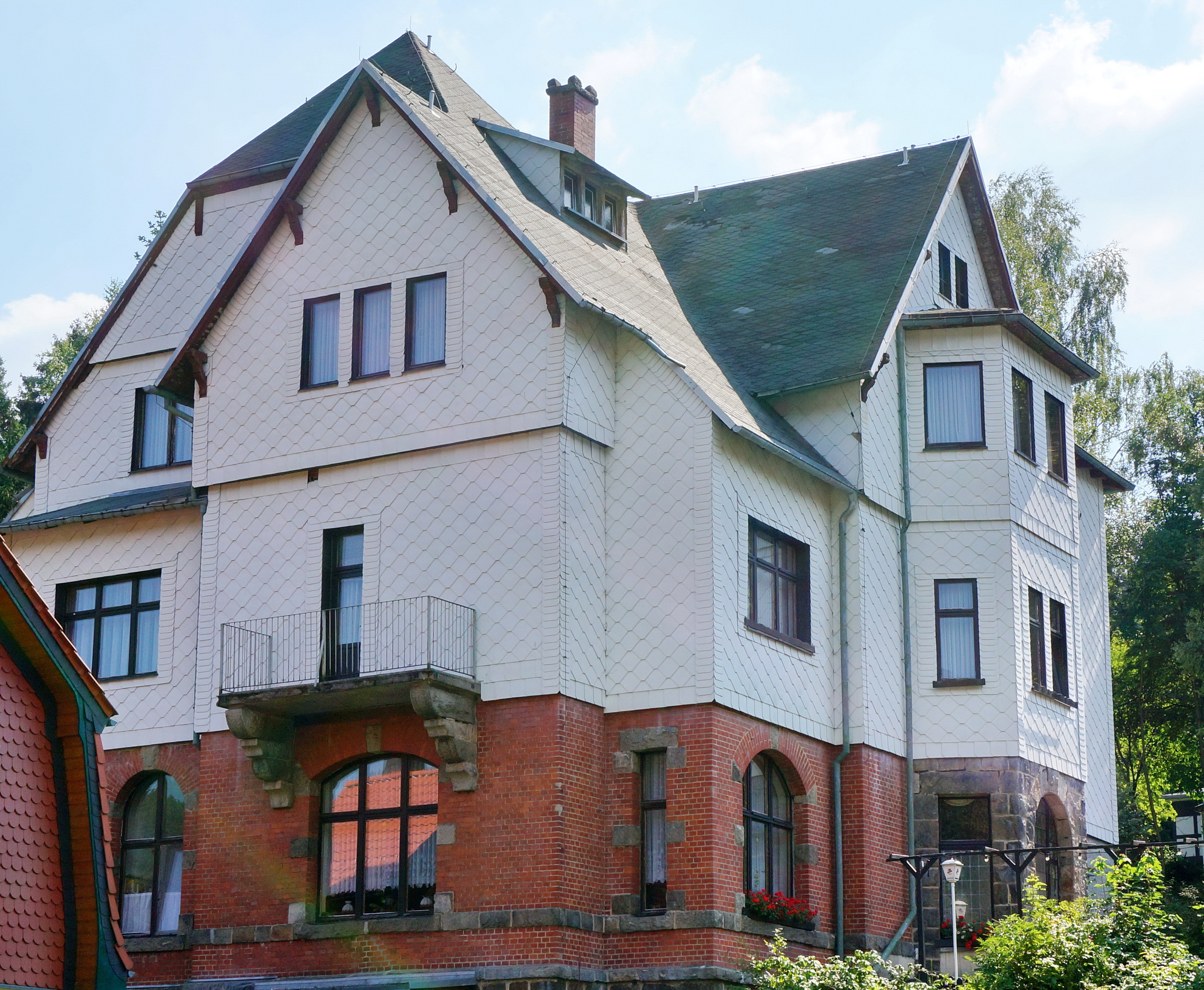 "1906 erbaute die Familie Aßmann das Haus als Pension" (zitiert aus dem Hausprospekt, August 2015) Das Haus ist ein Kulturdenkmal der Stadt Wernigerode, Ortsteil Schierke, mit der Erfassungsnummer 094 56120.